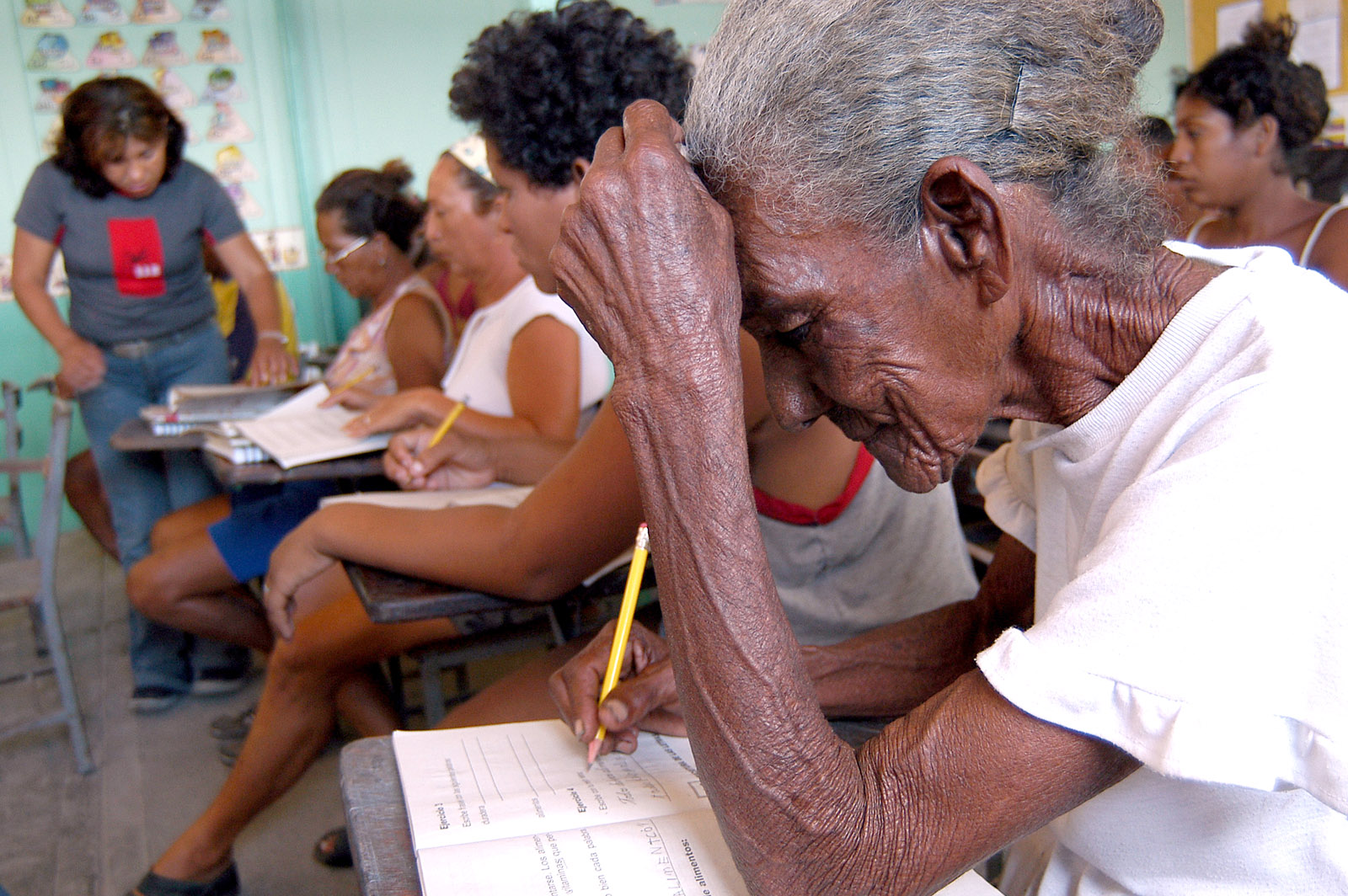 Plan Nacional de Alfabetización. Carmen Vásquez, de 85 años, esta aprendiendo a leer y escribir con la misión Robinson. Lugar: Isla Borracha, Estado Anzoátegui, Venezuela.